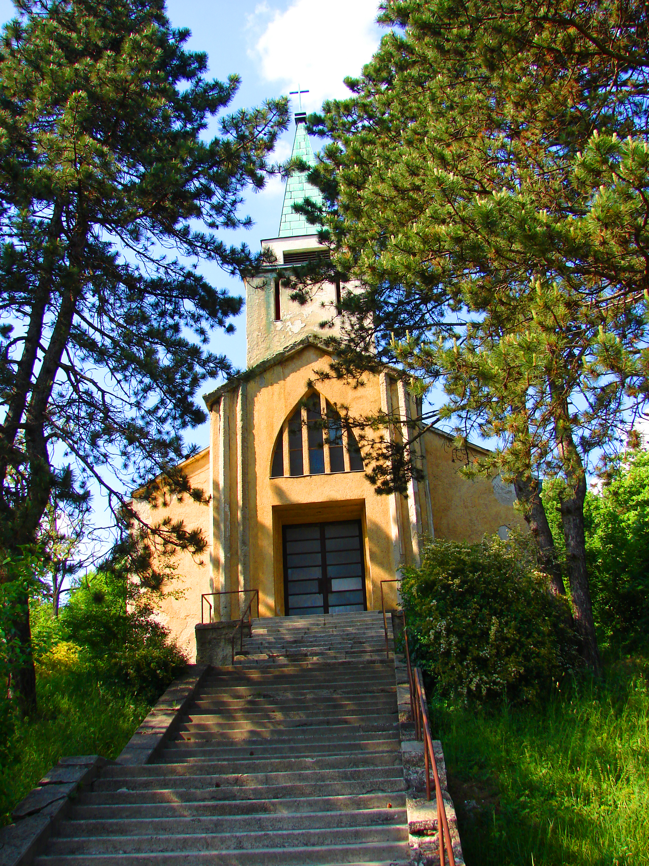 Szent Borbála templom, Csolnok (Komárom-Esztergom megye)